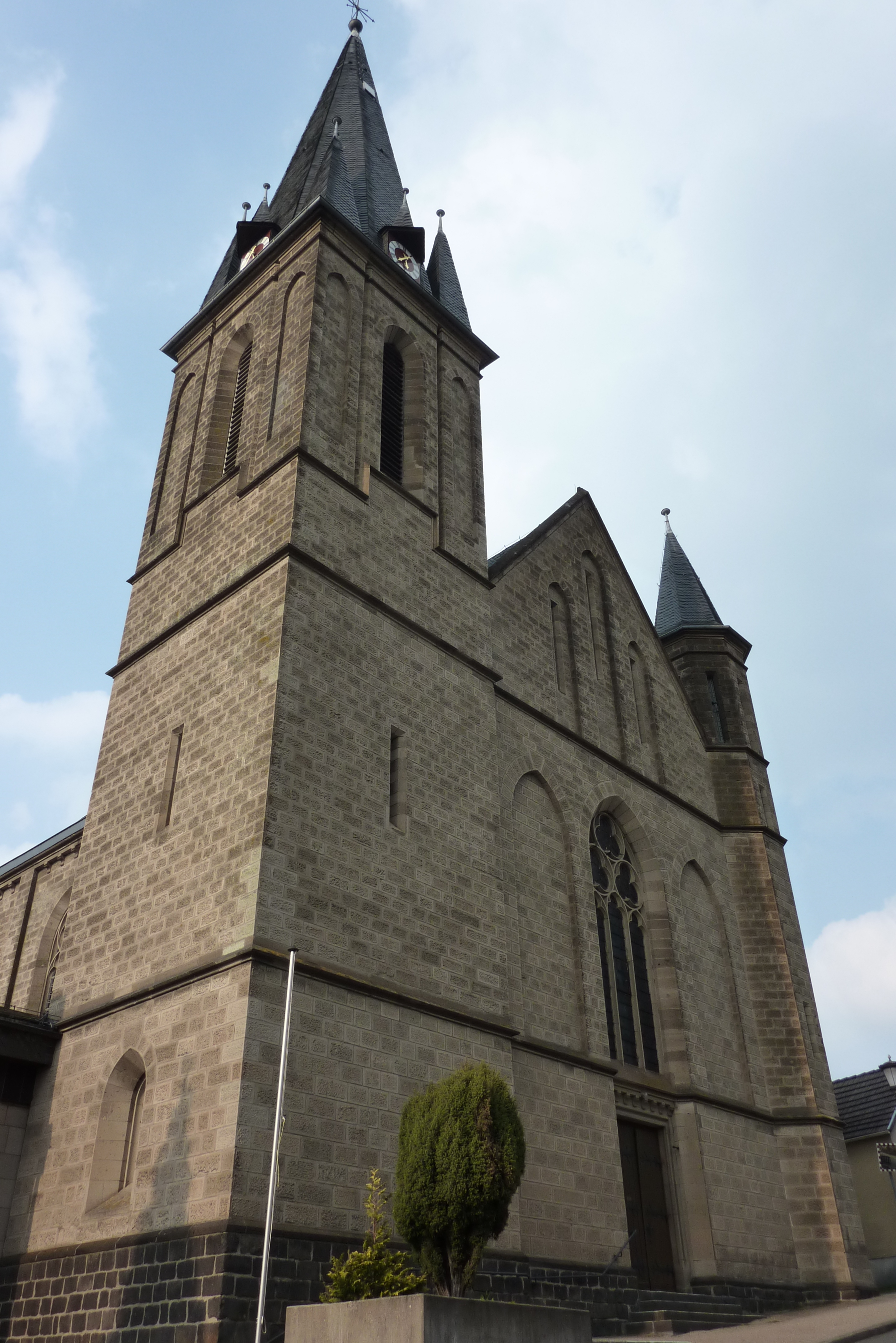 Katholische Kirche St. Barbara in Weibern, Turm und Portalfassade